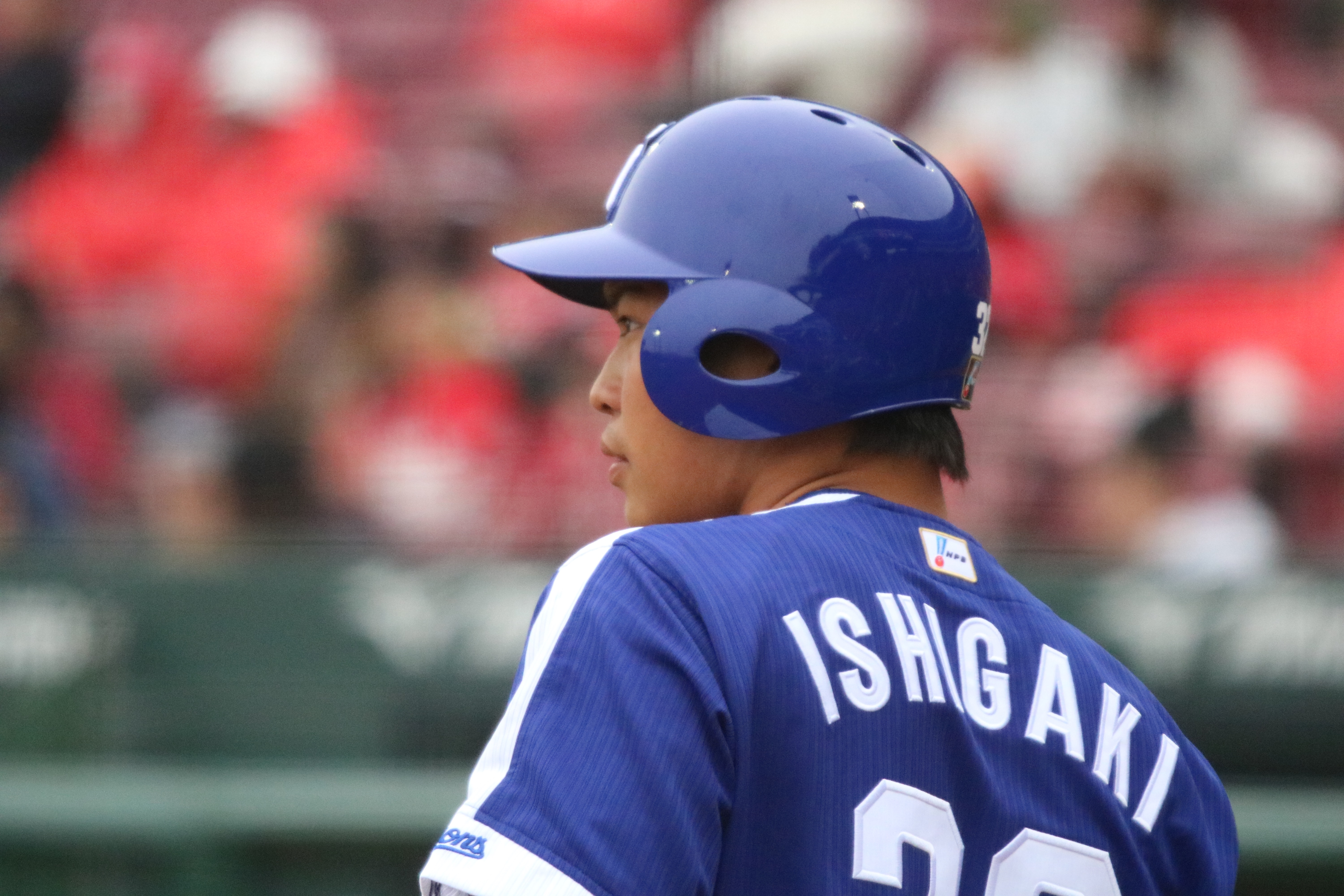 2018/4/14 ウエスタンリーグ